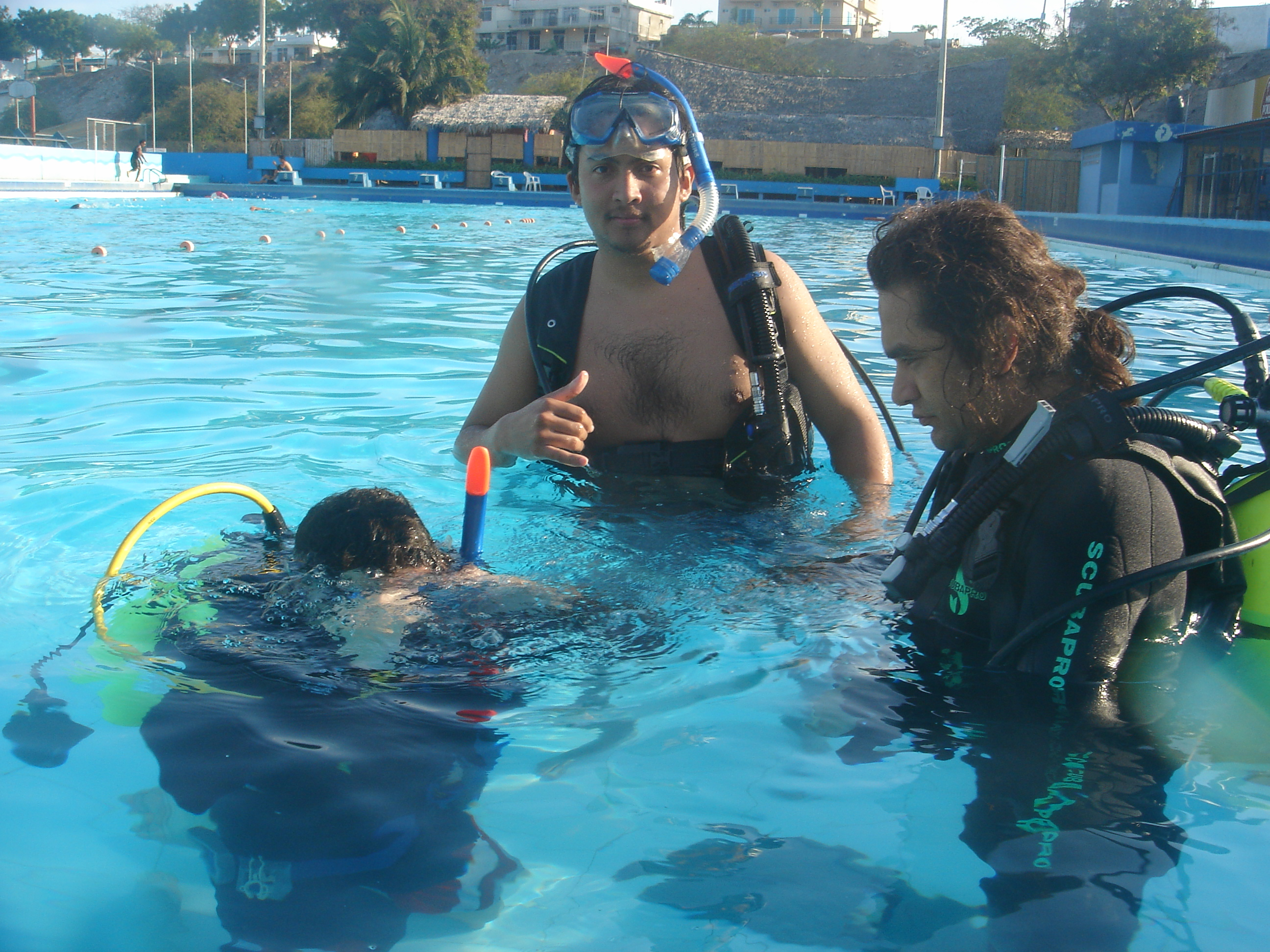 en clases de buceo